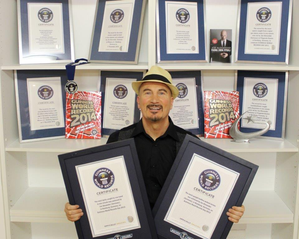 10-facher GWR-Rekordhalter Joe Alexander, Guinness World Records Day 2013 in Hamburg